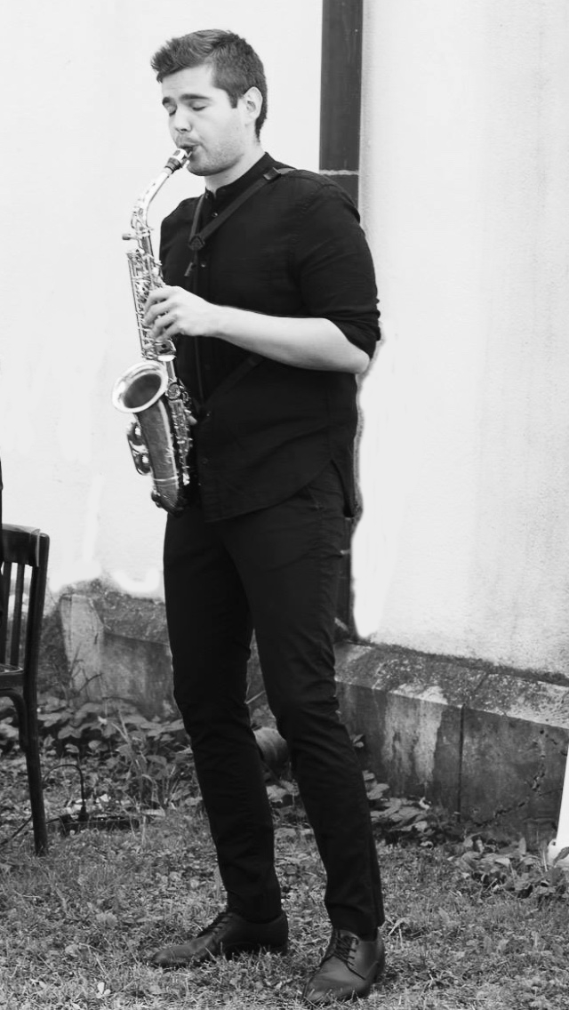 Marko Dzomba bei einem Auftritt.